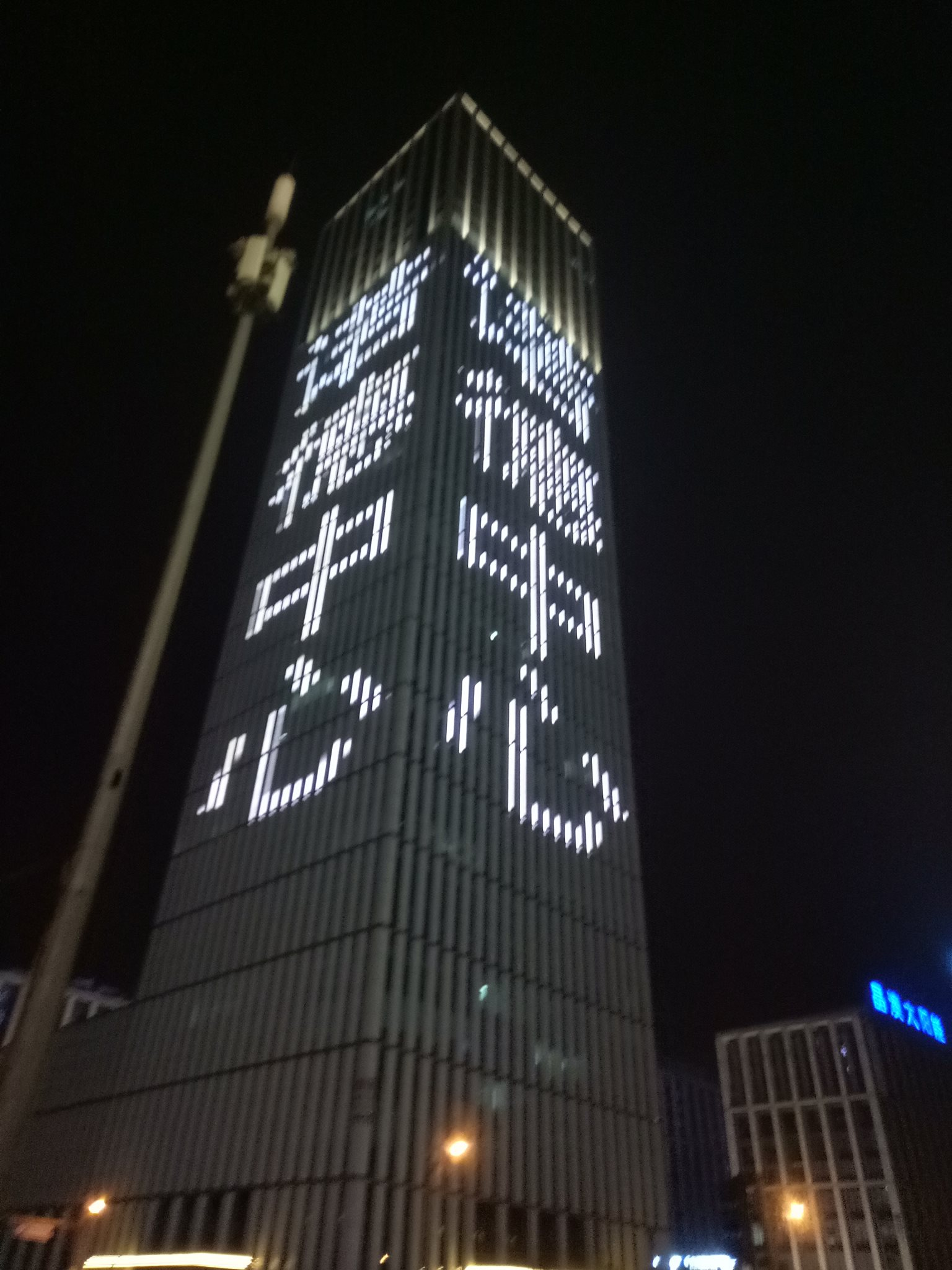 北京诺德中心夜景